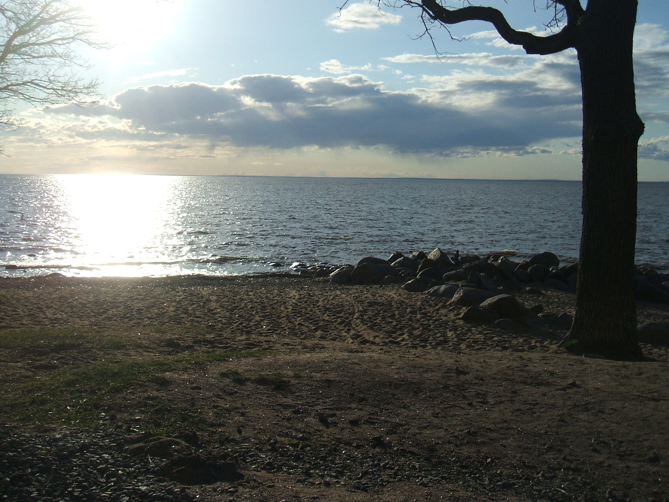 Мыс Дубковский - конец Дубковского шоссе